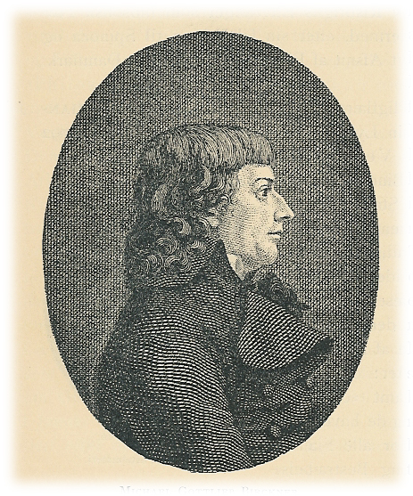 Michael Gottlieb Birckner